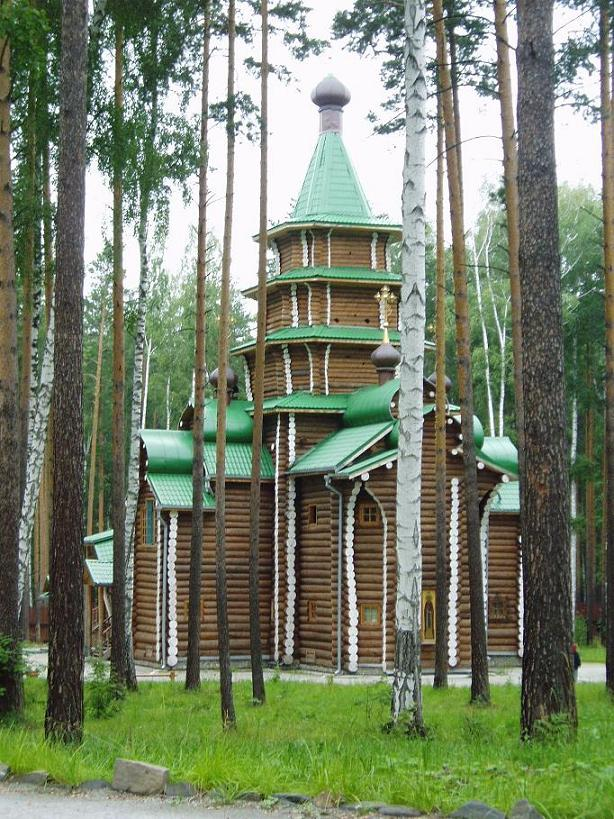 Kloostergebouw in Ganina Jama (Oeral)